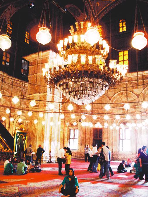 Mesquita de Mohamed Ali